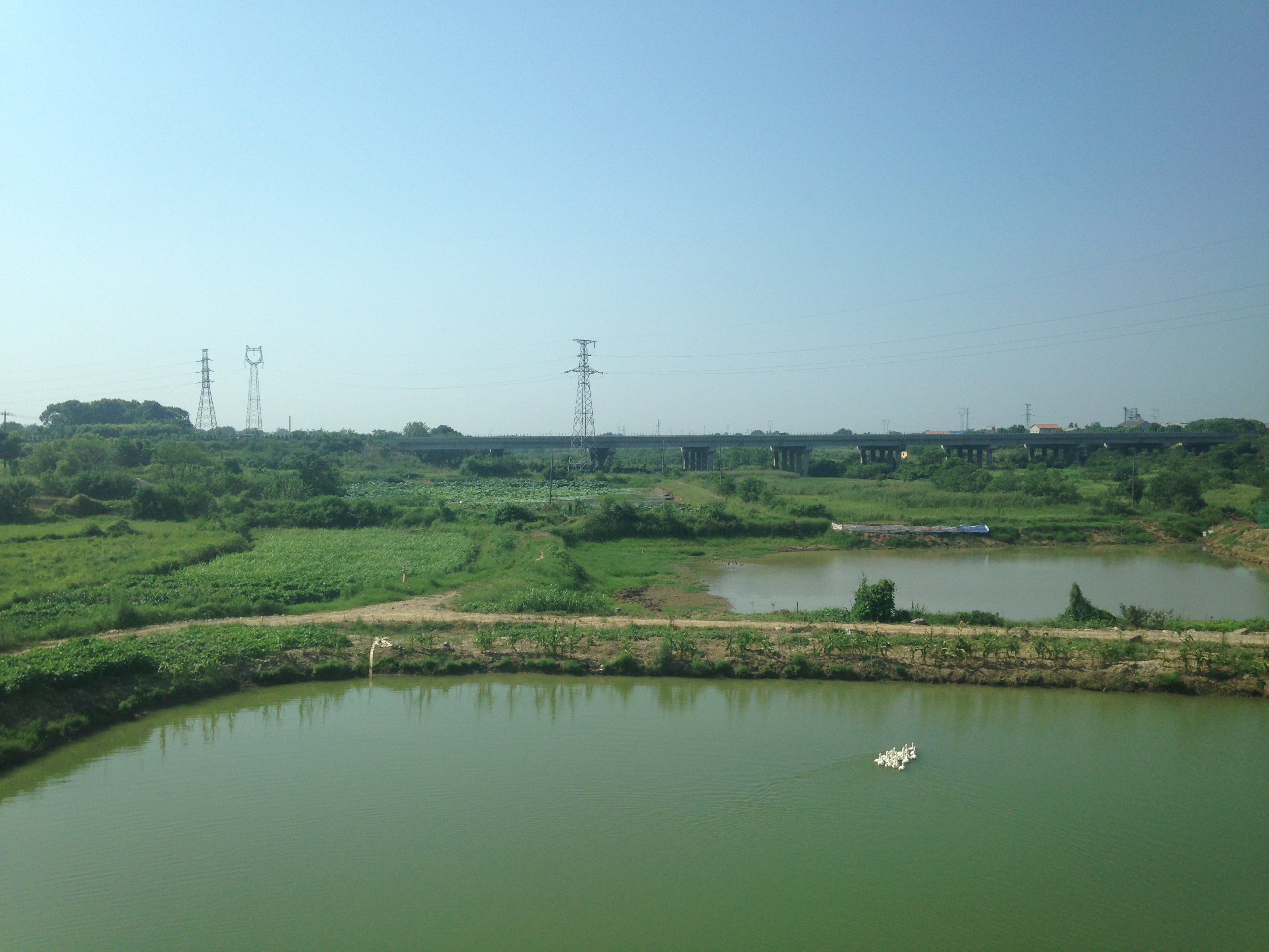 武岡都市間鉄道の列車内より望む鄂州市華容区華容鎮付近の景色